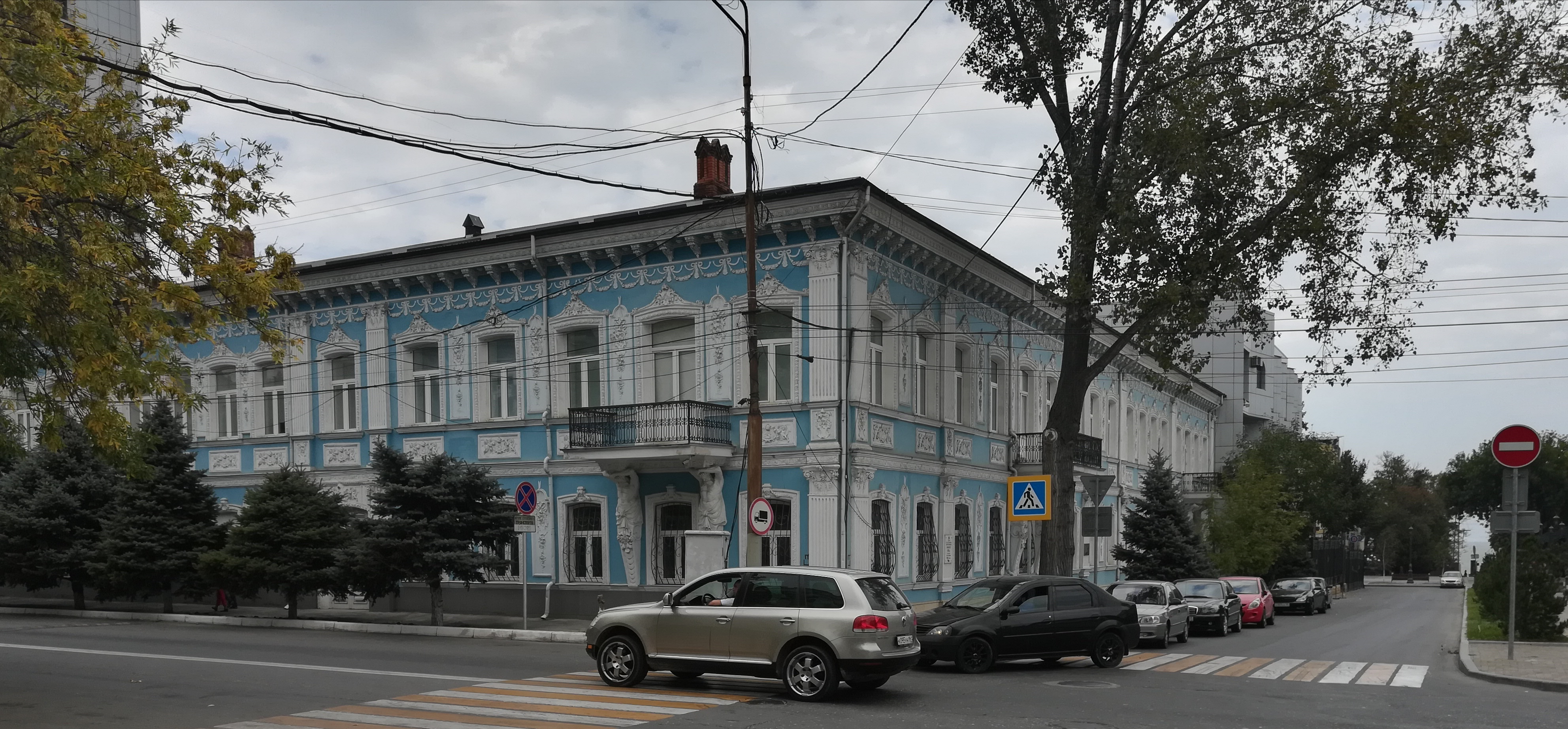 Махачкала